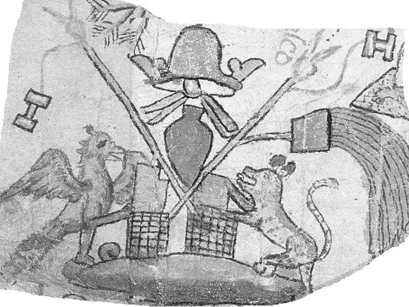 Glifo proveniente del Códice García Granados correspondiente a Azcapotzalco (siglo XVII)